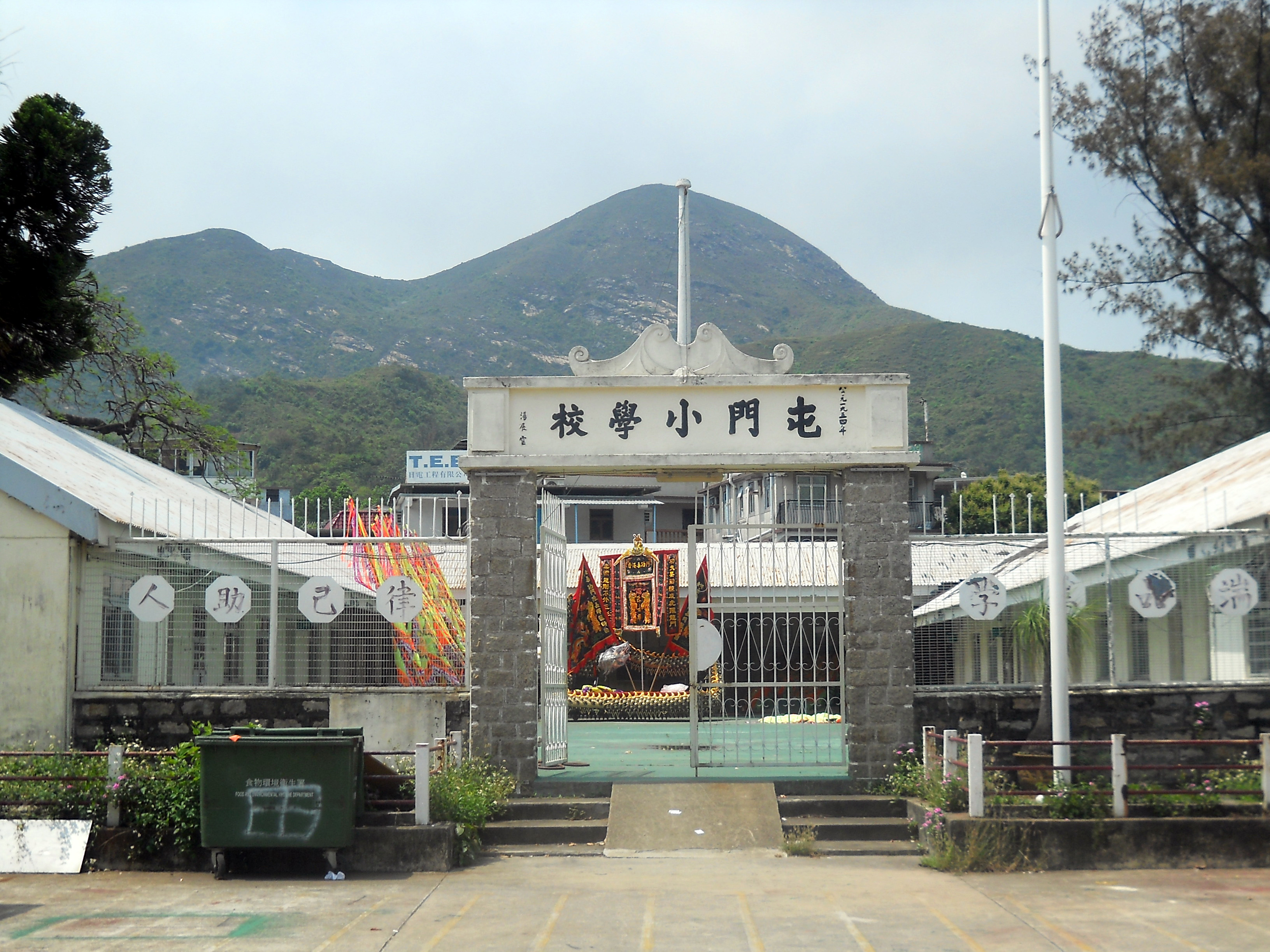 屯門小學校